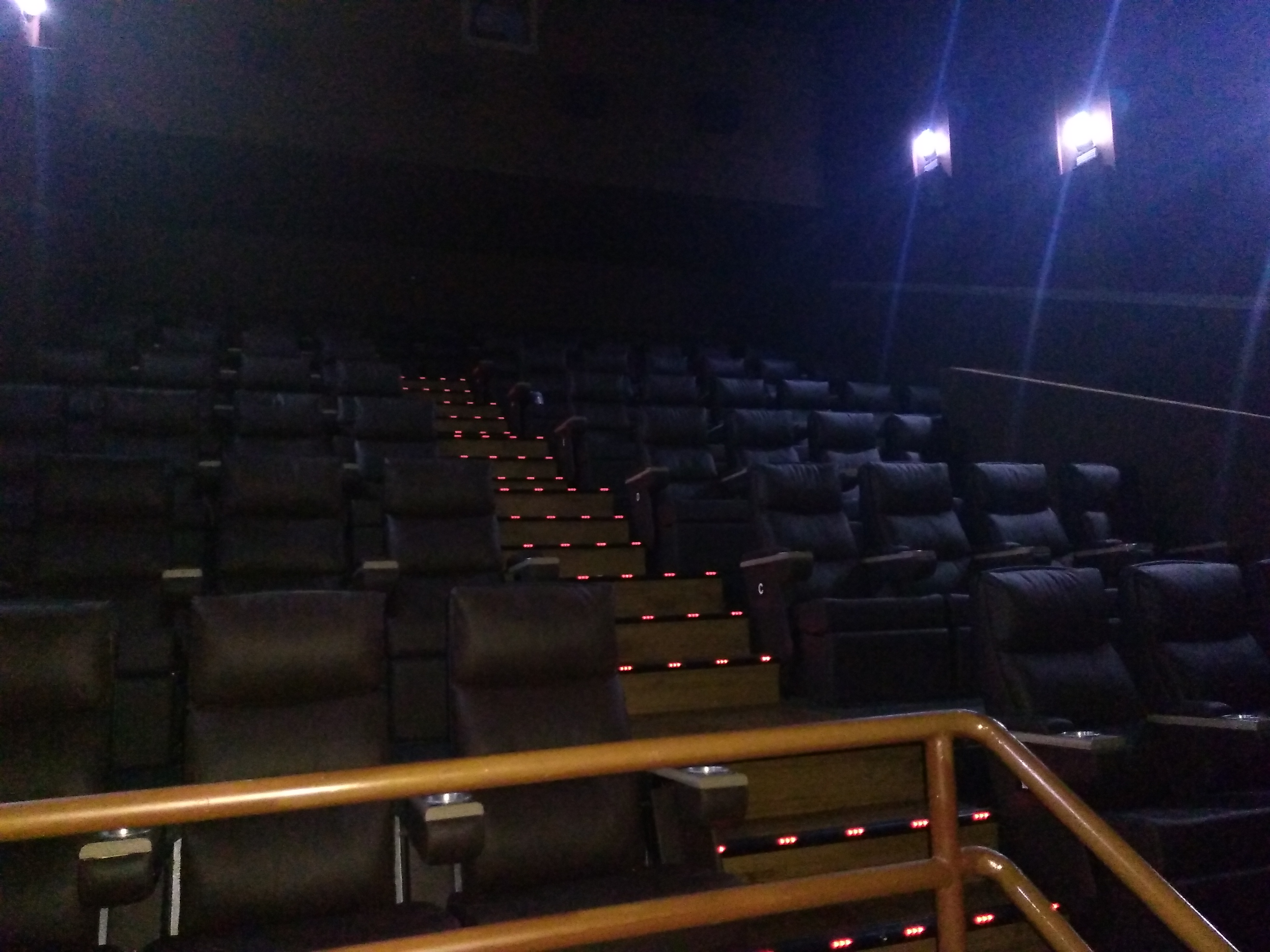 Vista da arquibancada da Sala 4 do Cinesercla Feira de Santana, localizado no América Outlet